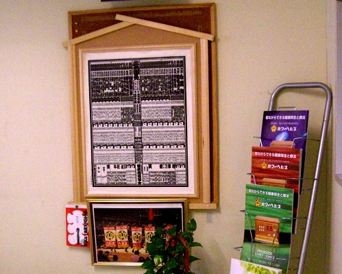 パワーへルス会場の大相撲番付と懸賞旗の写真 2014年